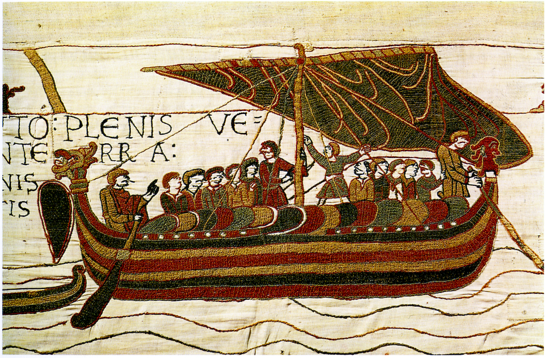 La flotte normande, tapisserie de la Reine Mathilde, Bayeux.